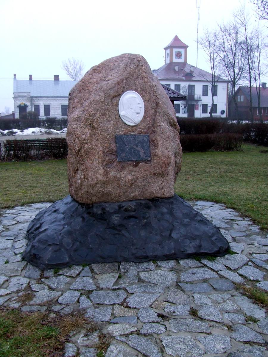 Brok, pomnik Wojciecha Jastrzębowskiego odsłonięty w 2004 roku